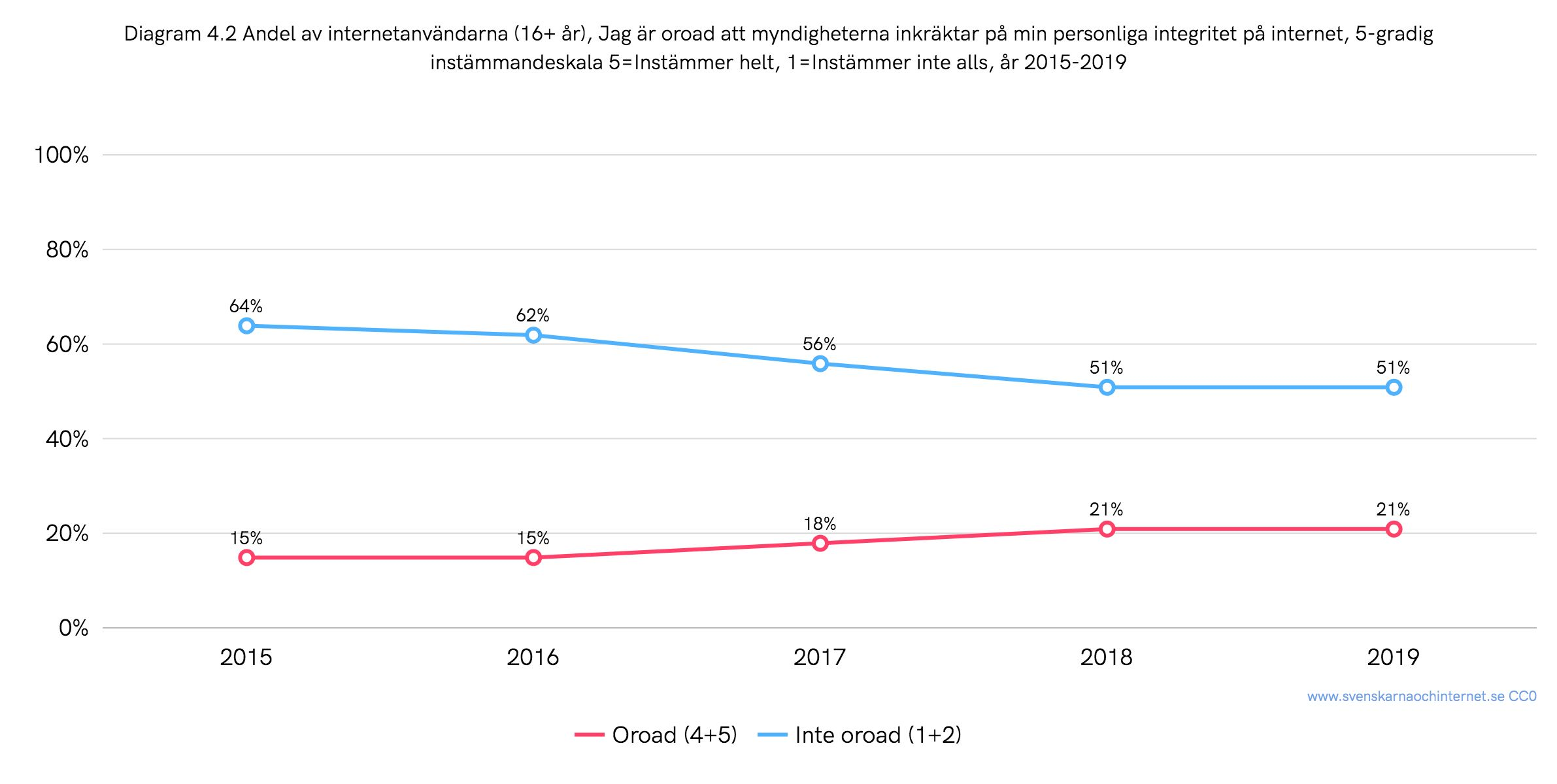 Andel av de svenska internetanvändarna (16+ år) som är oroad över att myndigheter inkräktar på den personliga integriteten på internet. 5-gradig instämmande skala, 5 = instämmer helt, 1 = instämmer inte alls. Åren 2015–2019. Siffror från undersökningen "Svenskarna och internet".